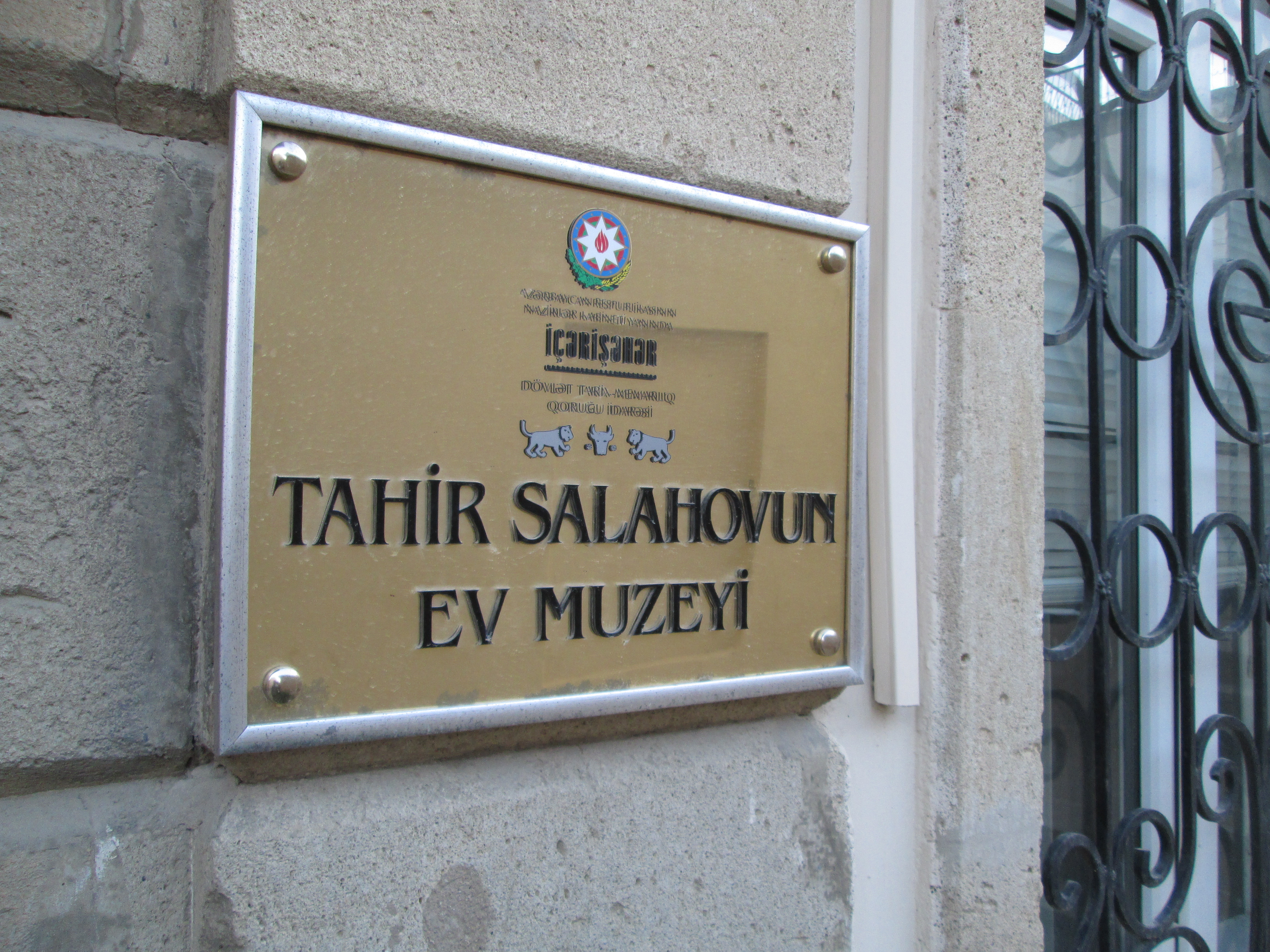 3-cü Əfəndiyev 1